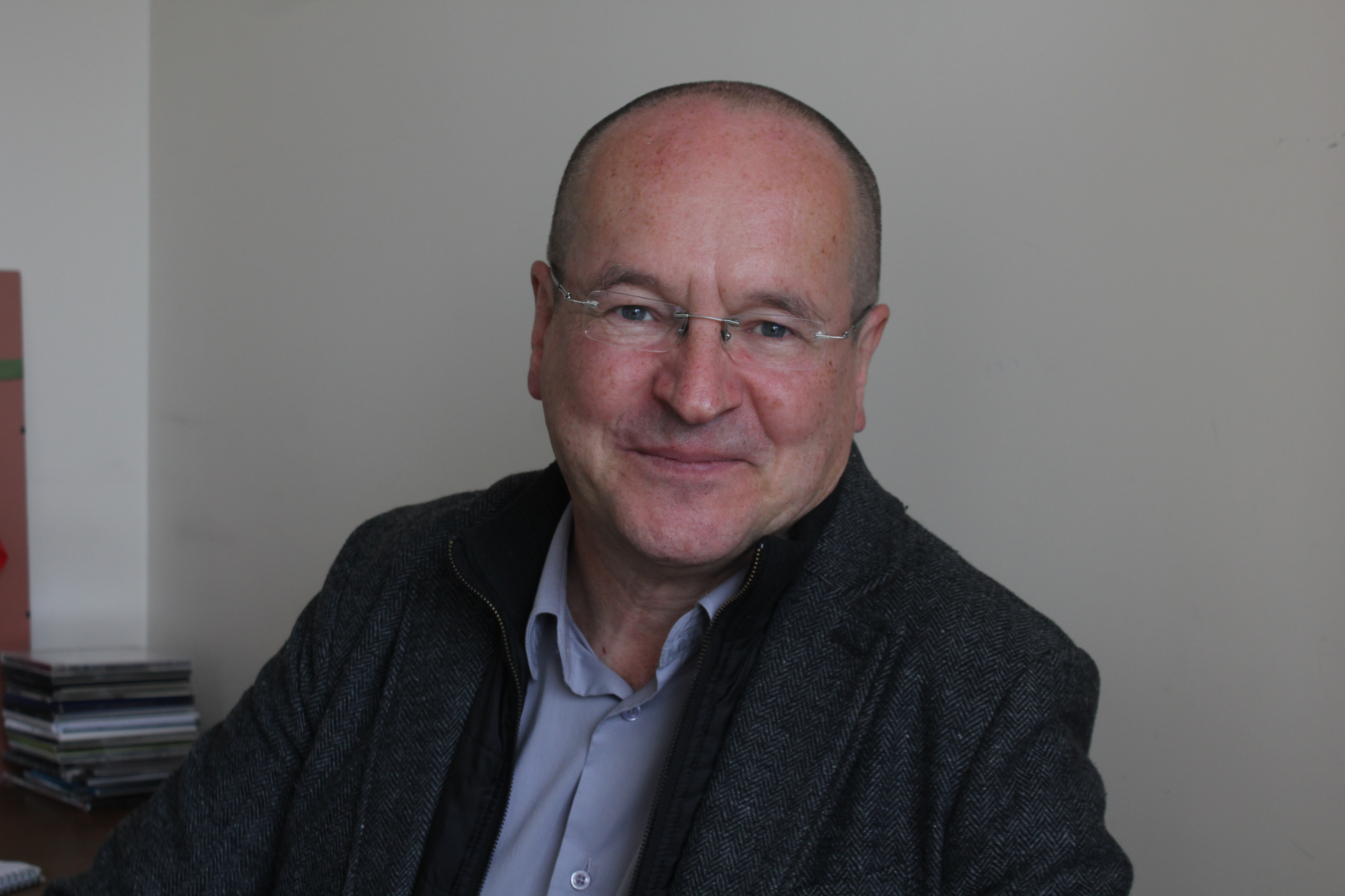 Prof. Valdis Muktupavels – muzykolog, folklorysta